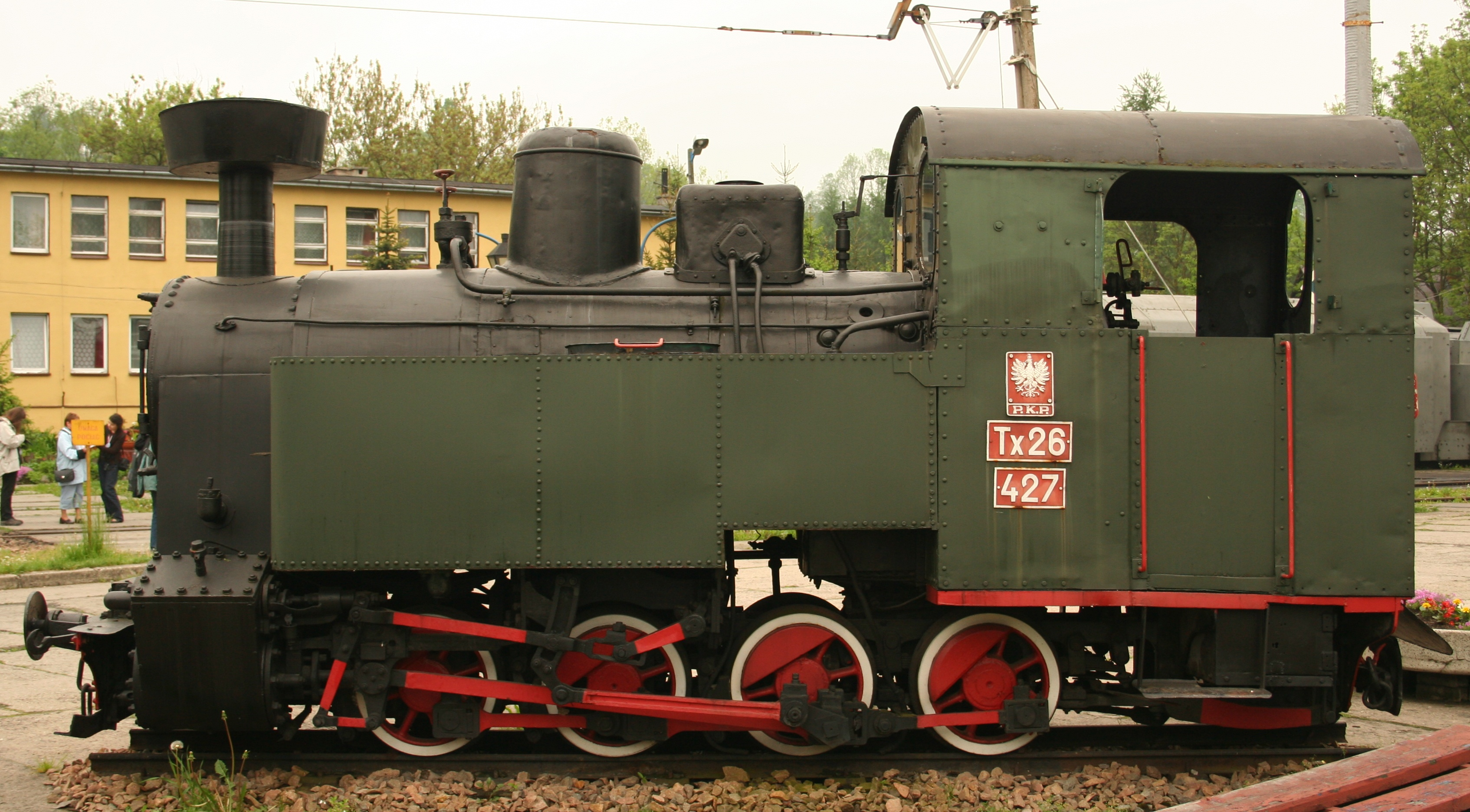 Lokomotywa wąskotorowa Tx26-427. Skansen taboru kolejowego w Chabówce